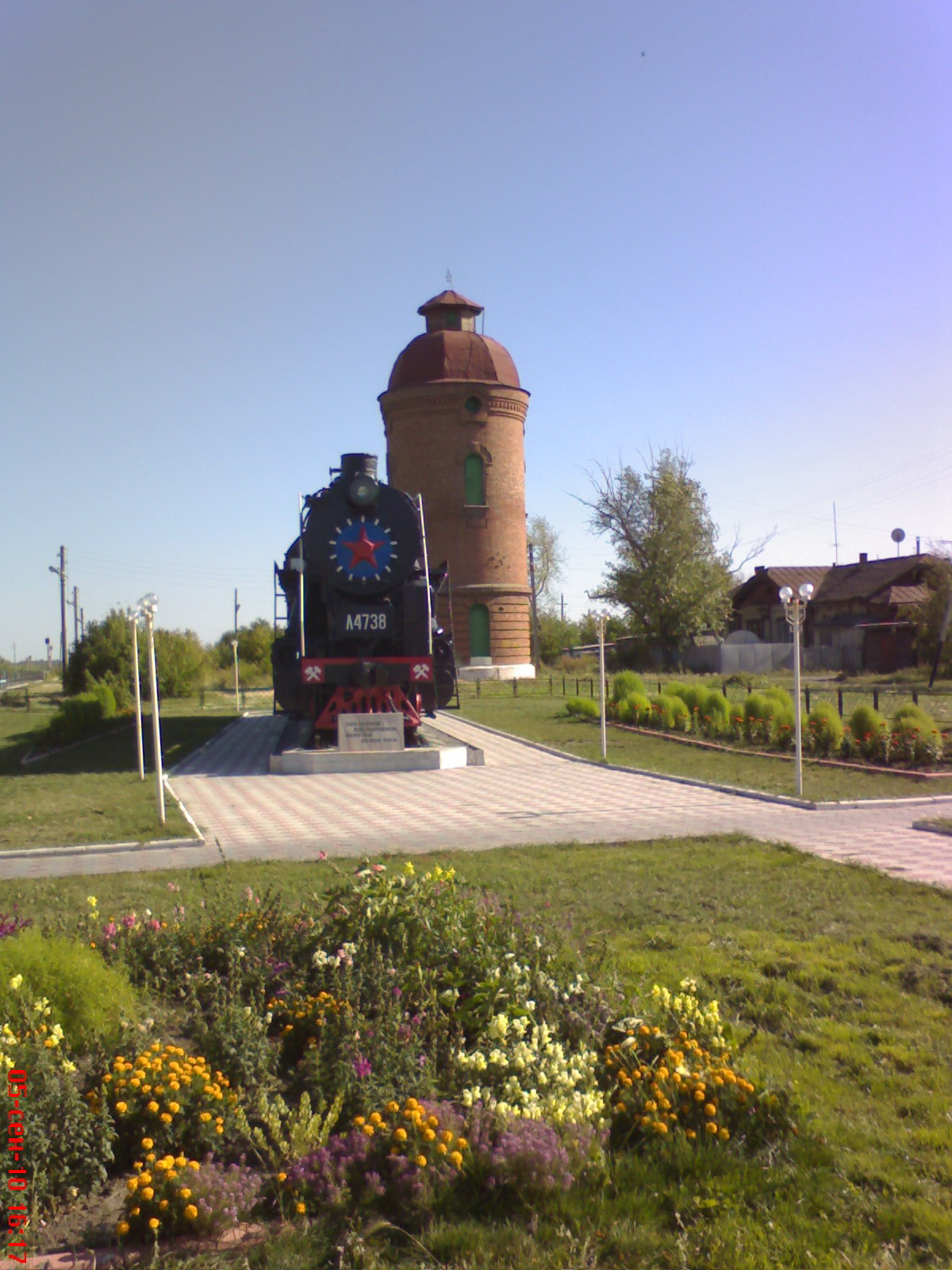 водонапорная башня 1913г первое кирпичное здание